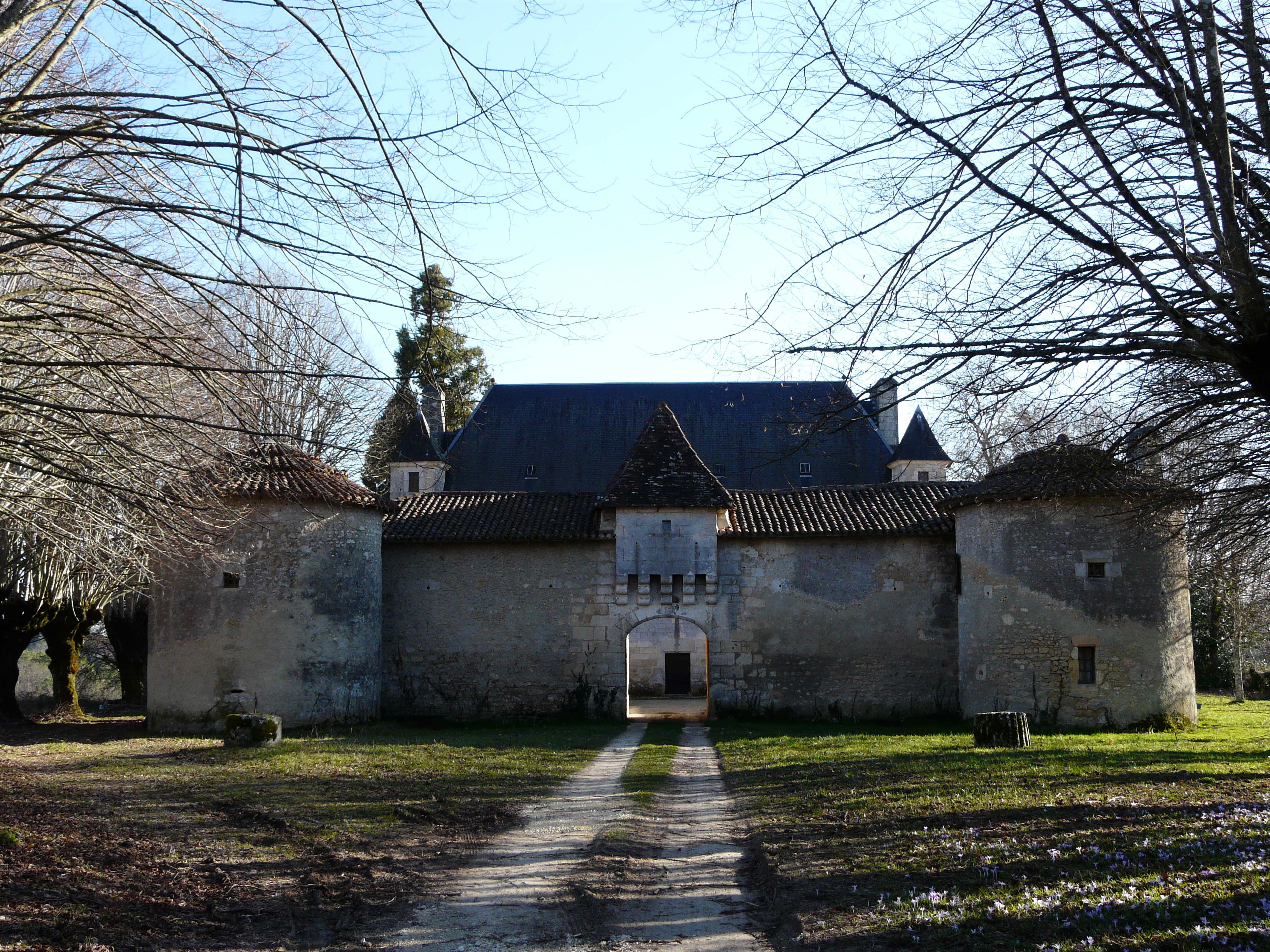 Le manoir de Jaillac, Sorges, Dordogne, France Object location45° 17′ 11.2″ N, 0° 49′ 11″ E